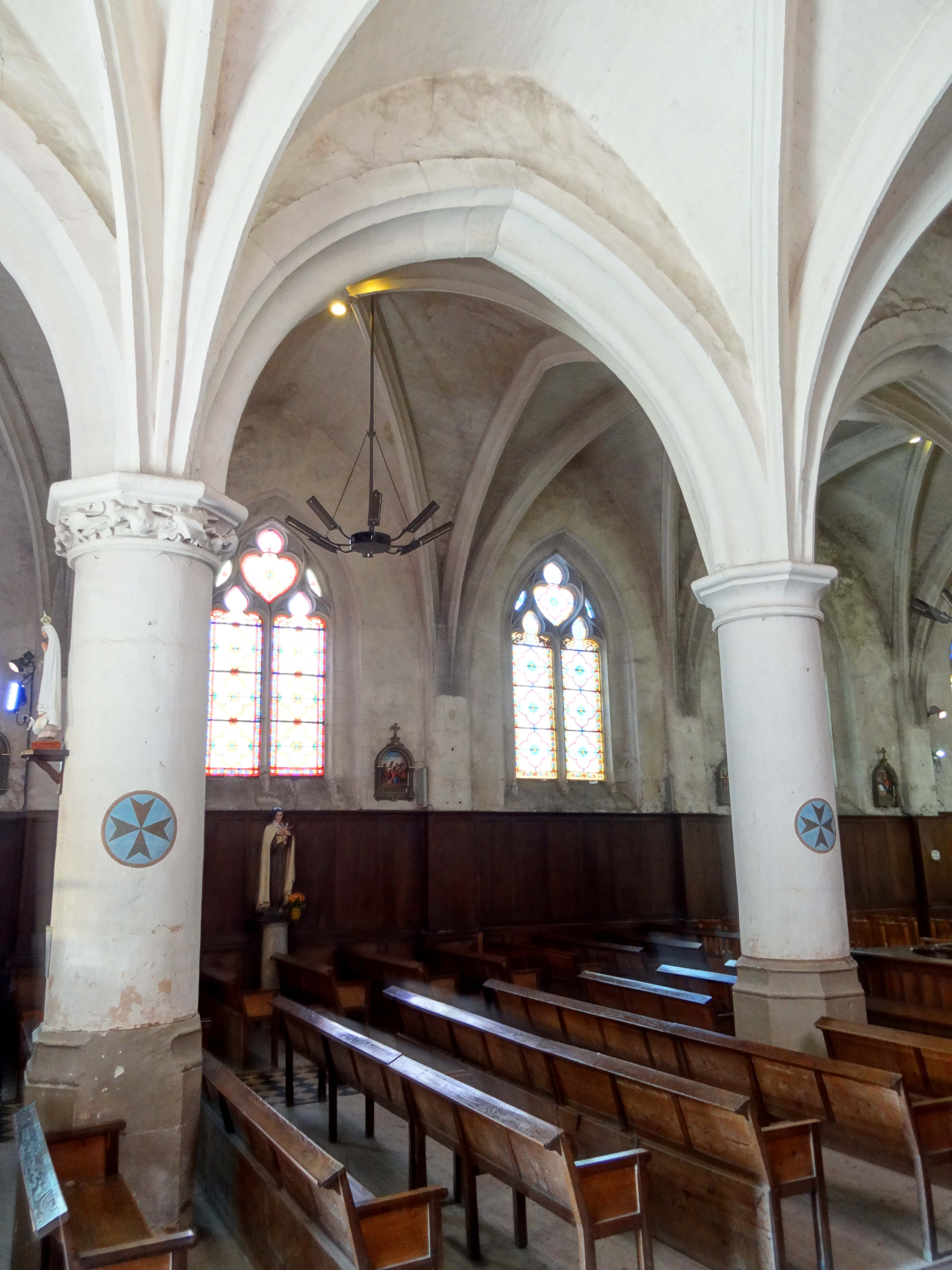 Intérieur de l'église - voir titre.